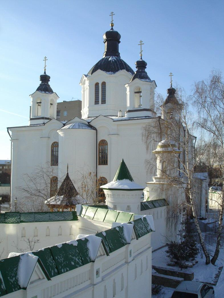 Подворье Ново-Тихвинского монастыря было основано здесь еще при первой настоятельнице игумении Таисии, в начале XIX века. В 1876 году на Елизаветинской заимке был построен каменный трехпрестольный храм в честь Всемилостивого Спаса. Боковые приделы освящены в честь Архистратига Божия Михаила и великомученицы Параскевы.. Главной святыней храма являются мощи преподобного Василиска Сибирского. Этот угодник Божий жил в XIX веке, но по молитвенному преуспеянию был равен древним святым отцам.